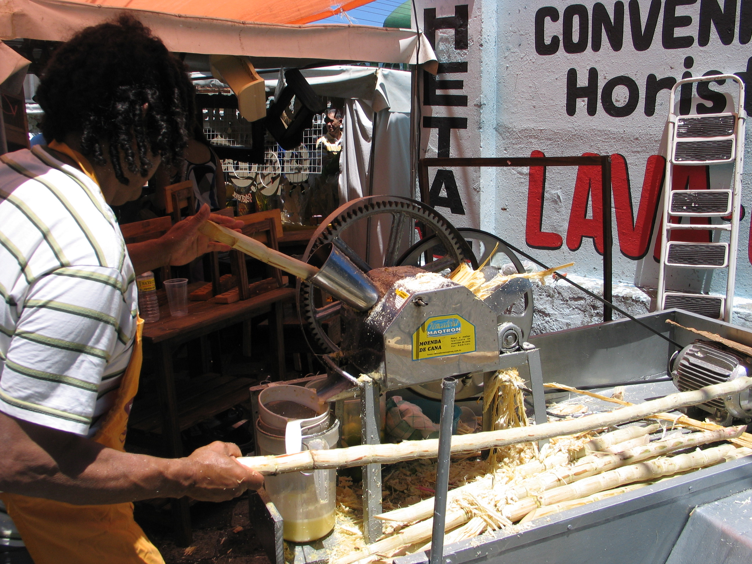 הכנת מיץ קנה סוכר, צולם בעיר קוריטיבה,ברזיל